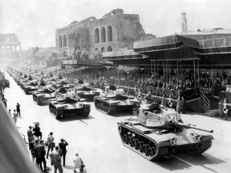 Carri M60 in dotazione al XVIII battaglione carri del 1° Reggimento bersaglieri corazzato di stanza a Civitavecchia a Roma durante la sfilata lungo via dei Fori Imperiali per la festa della Repubblica